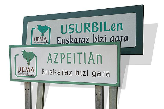 arnasguneak UEMA